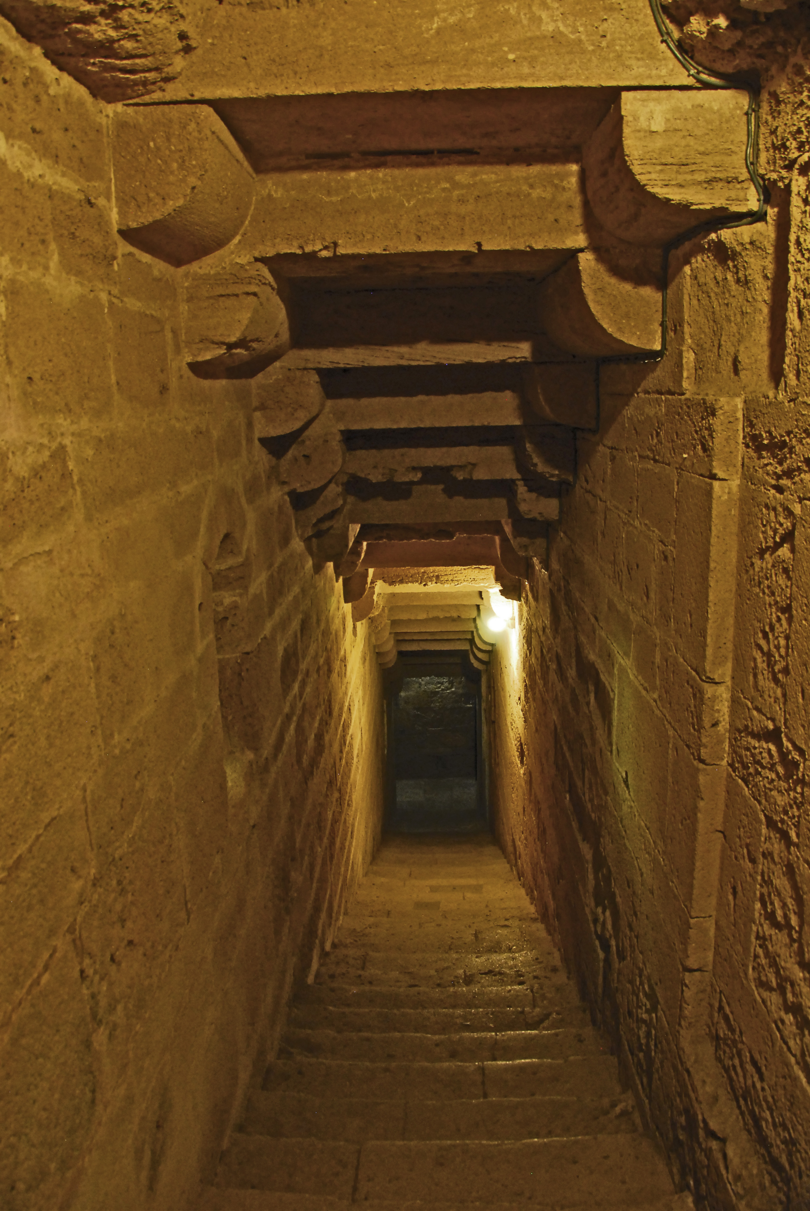 St-Pierre-et-St-Paul de Maguelone, Geschosstreppe abwärts